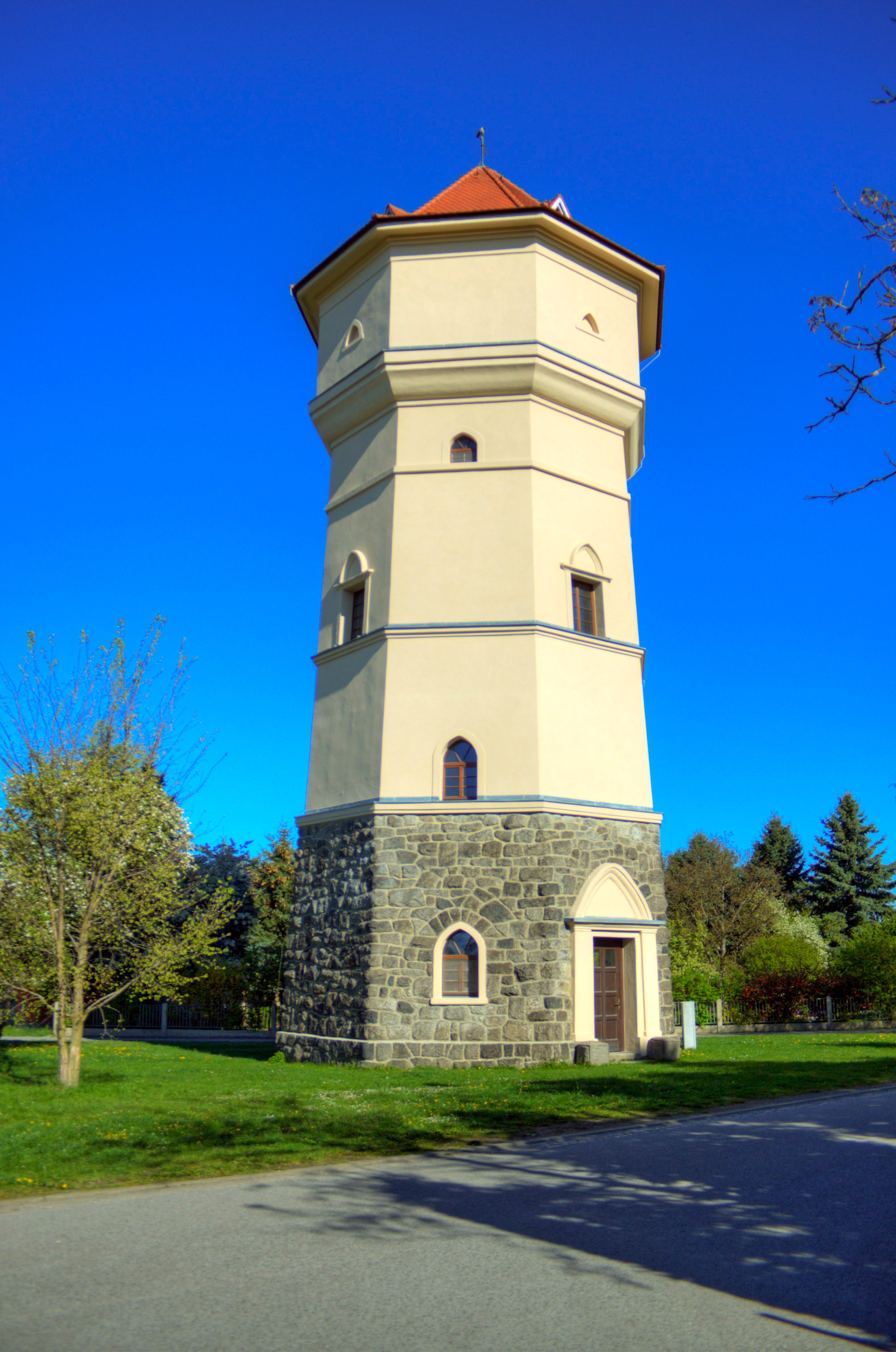 Wasserturm Großdubrau Hornjoserbsce: Wodarnja we Wulkej Dubrawje